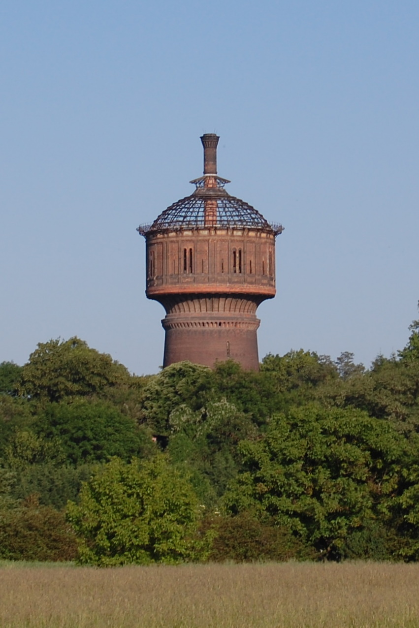 Blick aus östlicher Richtung auf den Wasserturm Salbke